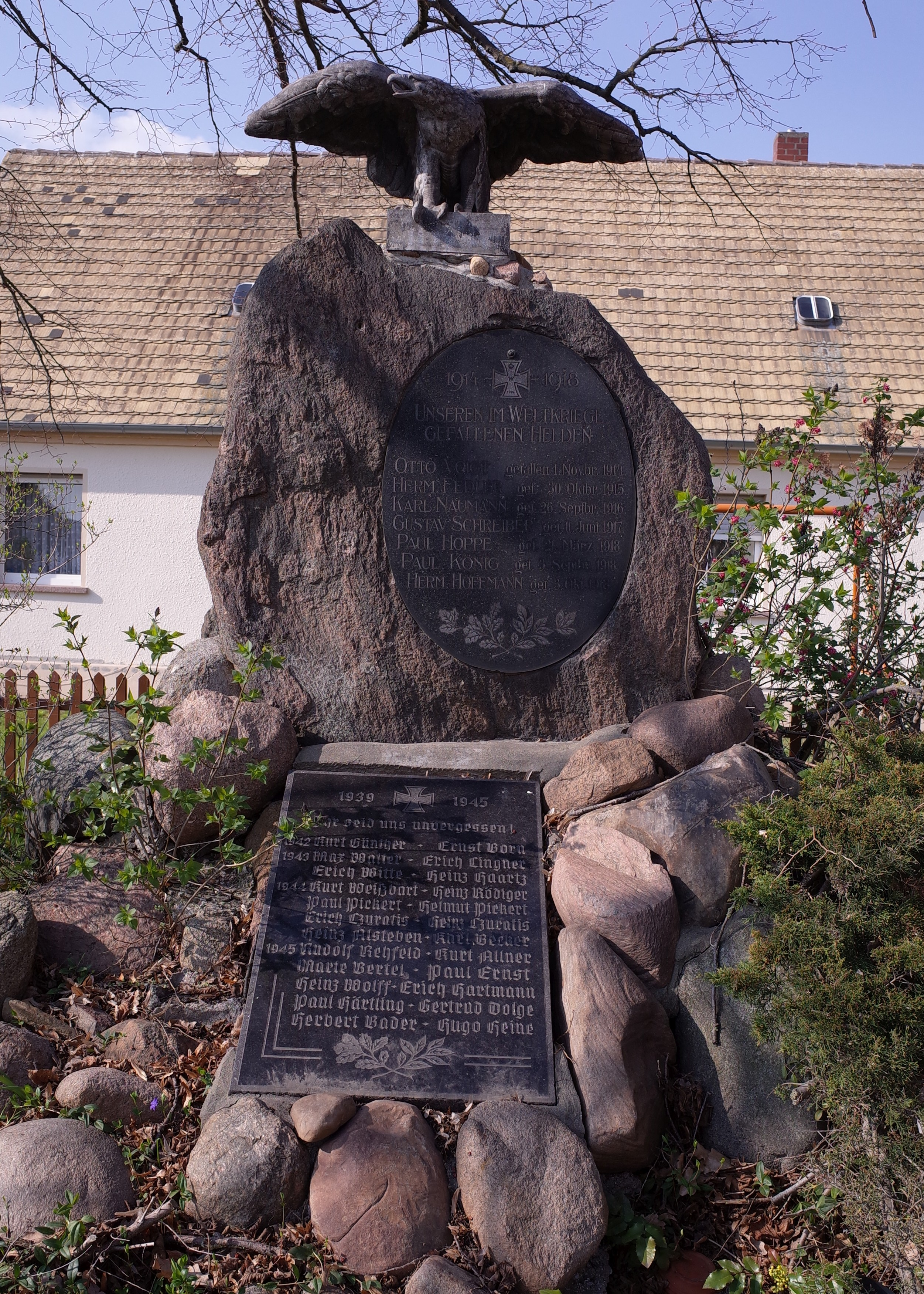 Aken (Elbe), Ortsteil Kleinzerbst, Kriegerdenkmal.